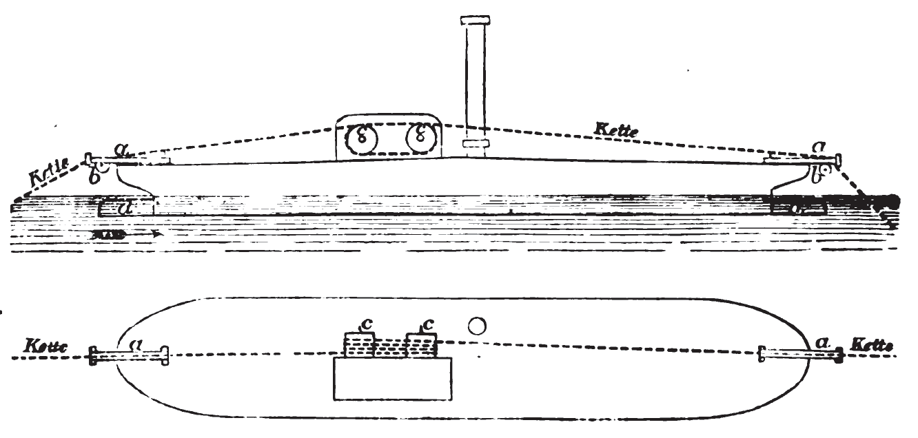 Notizen über den Schiffszug mittelst versenkter Ketten oder Drahtseile und über die mit den Seil - Remorqueuren auf der Maas in Belgien angestellten Versuche. In: Archiv für Seewesen, Band V, Heft X , 1869 Seite 466-481